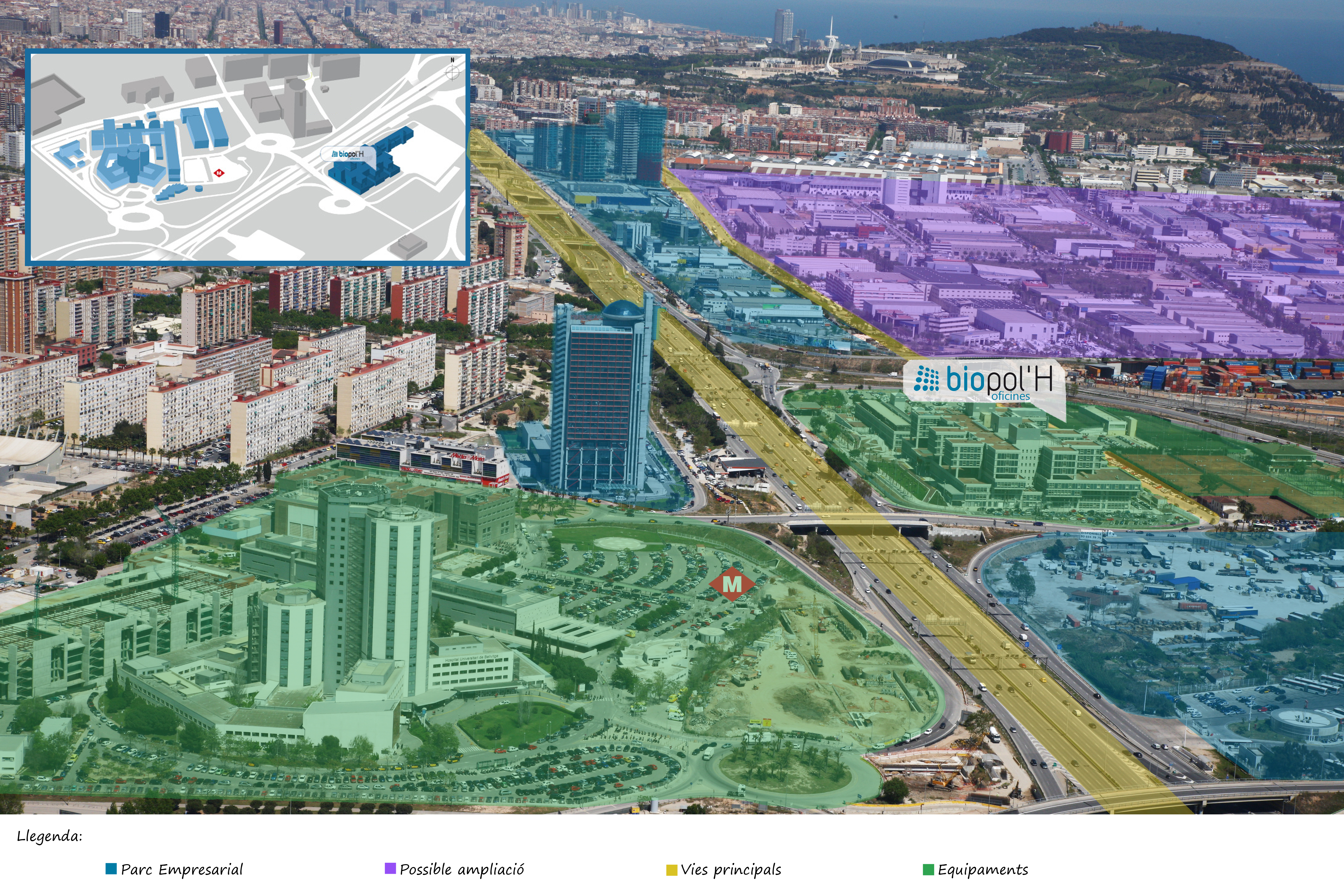 Imatge aèria del projecte Consorci Biopol de L'Hospitalet de Llobregat a la Gran Via